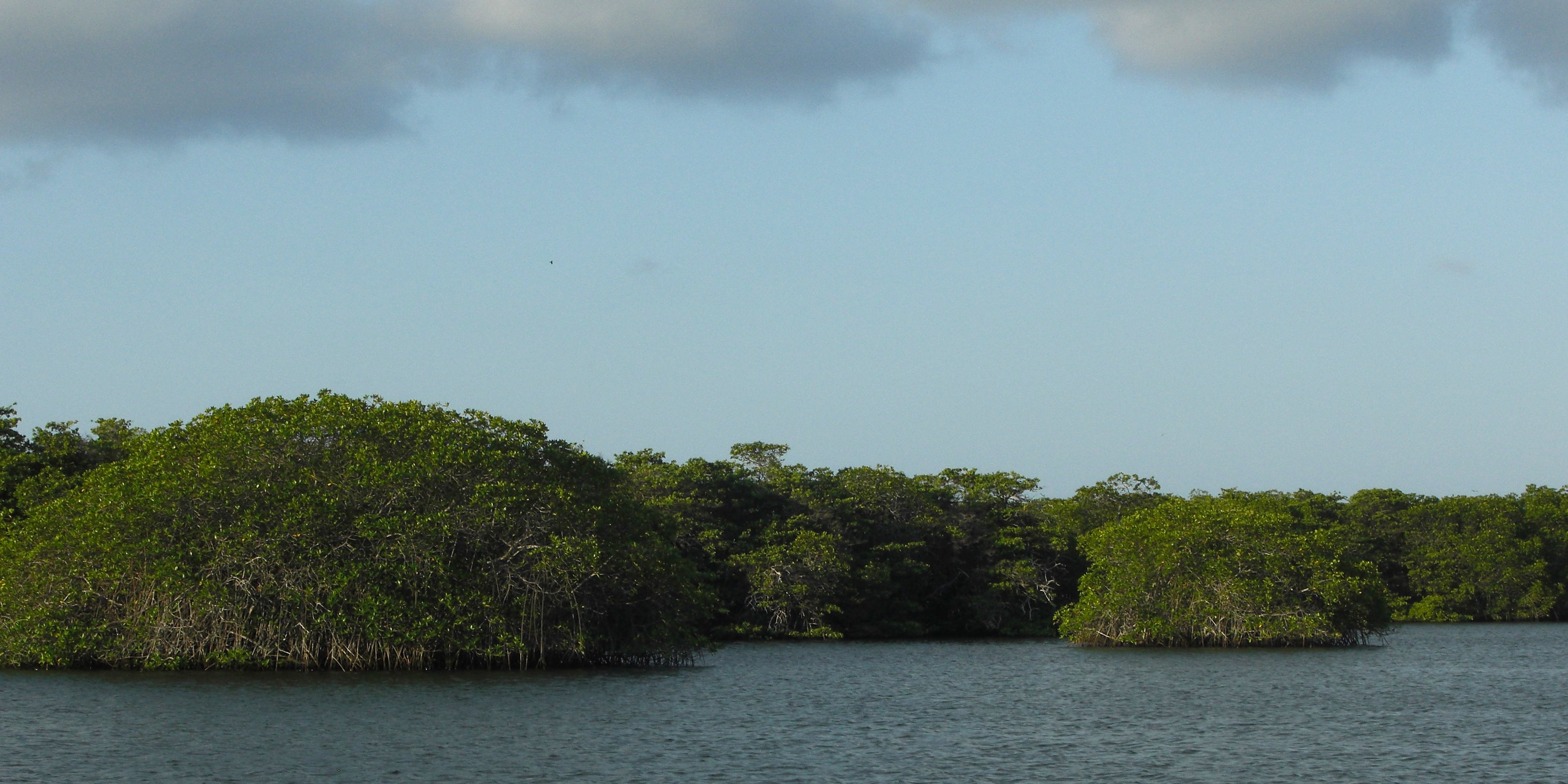 Rhizophora mangle Caleta Tortuga Negra, Santa Cruz Island, Galápagos, 20130128-5